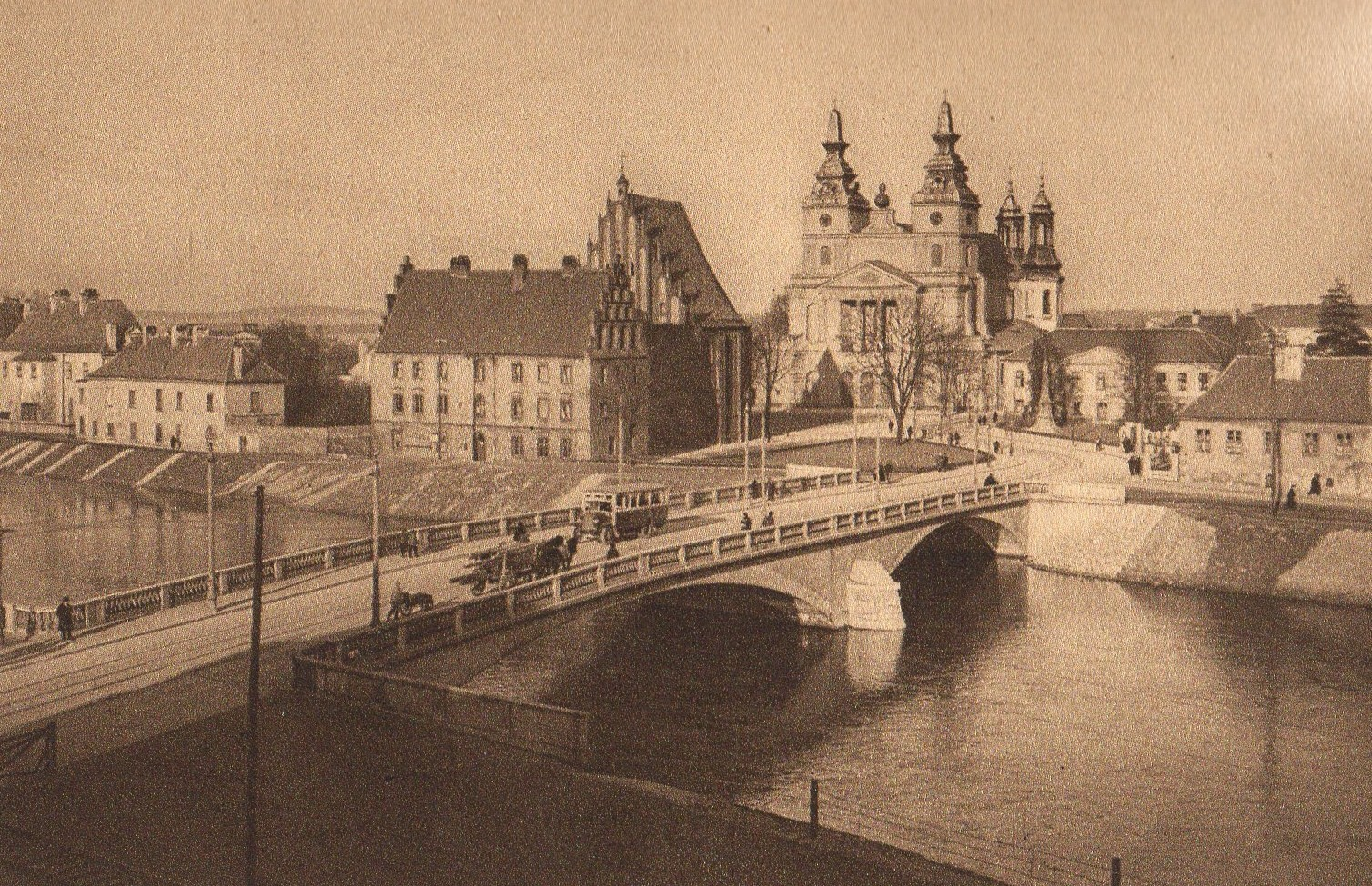 Most Chrobrego w Poznaniu około 1929r.